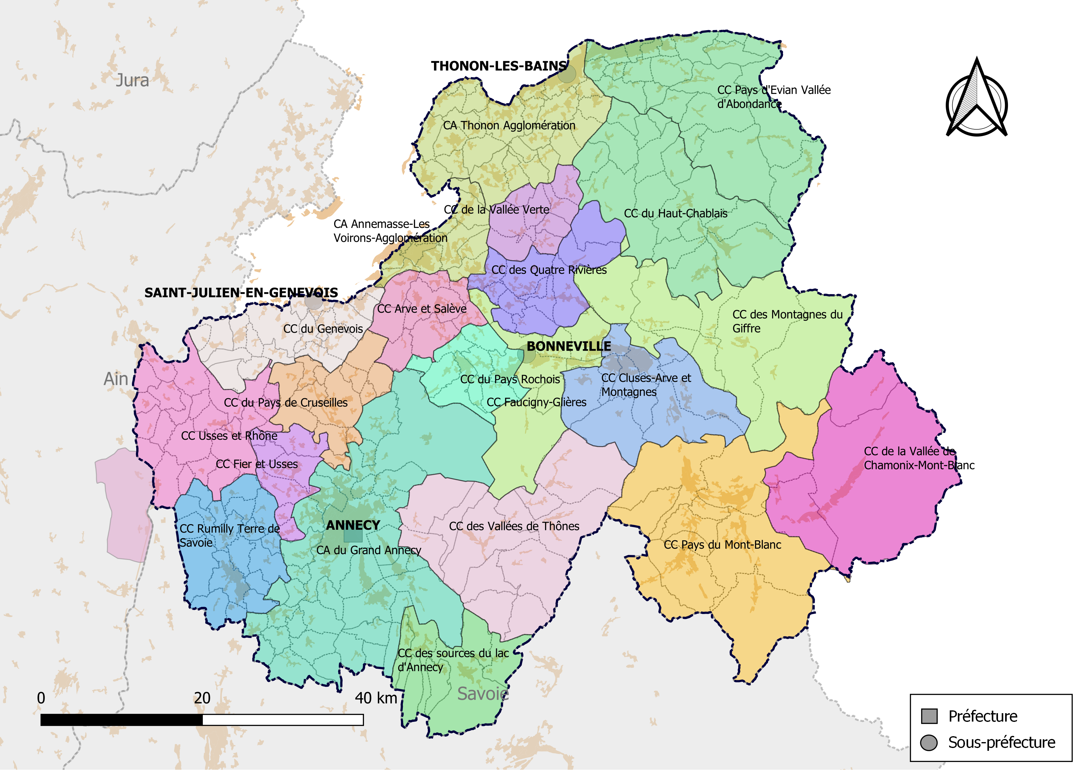 Carte des intercommunalités du département de Haute-Savoie, France. Composition au 1er janvier 2019.